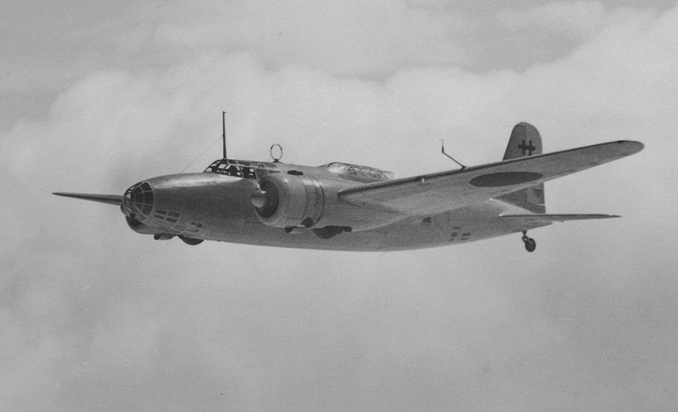 浜松で撮影された九七式重爆撃機